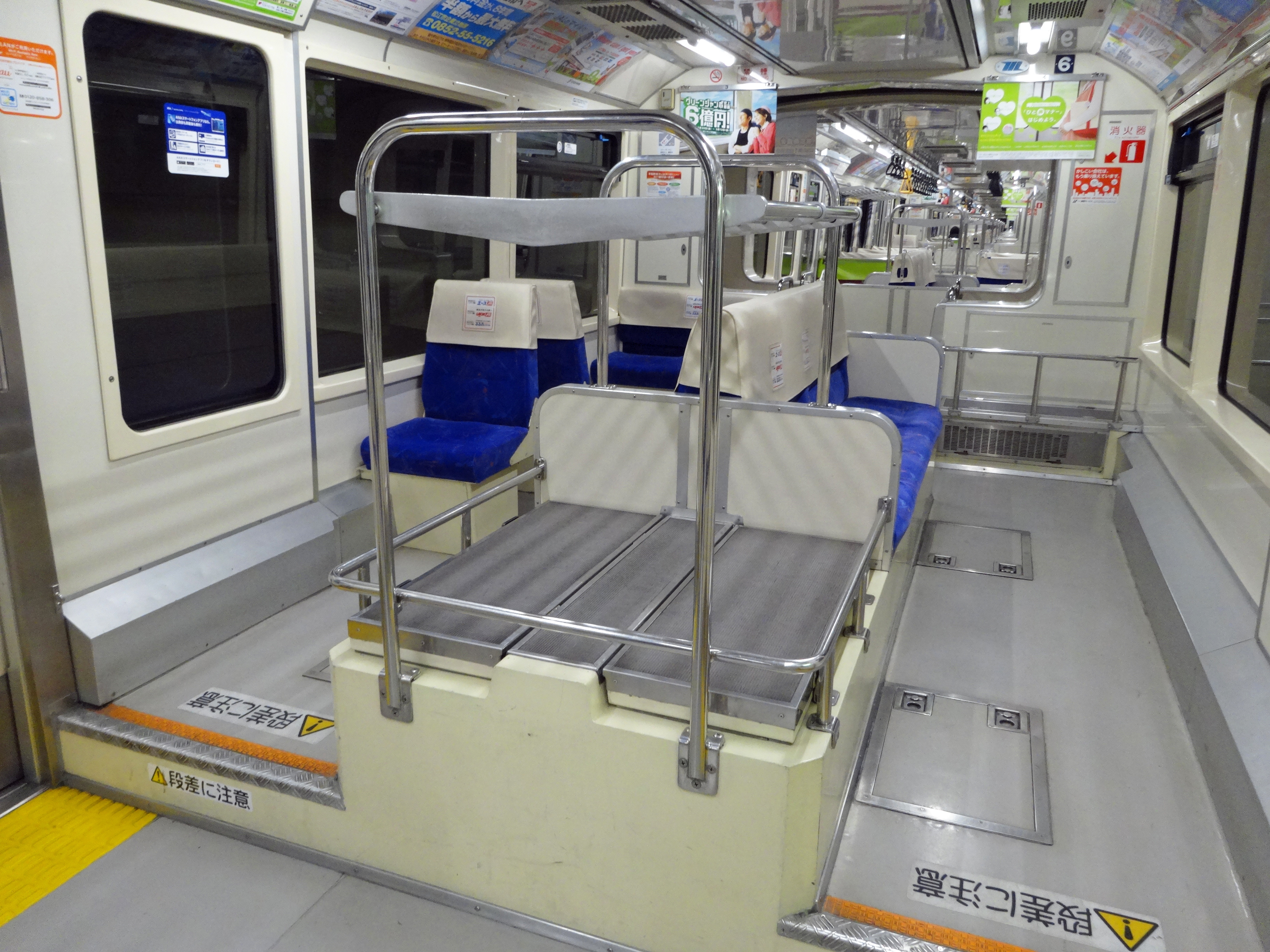 東京モノレール1000形車内（営業列車）